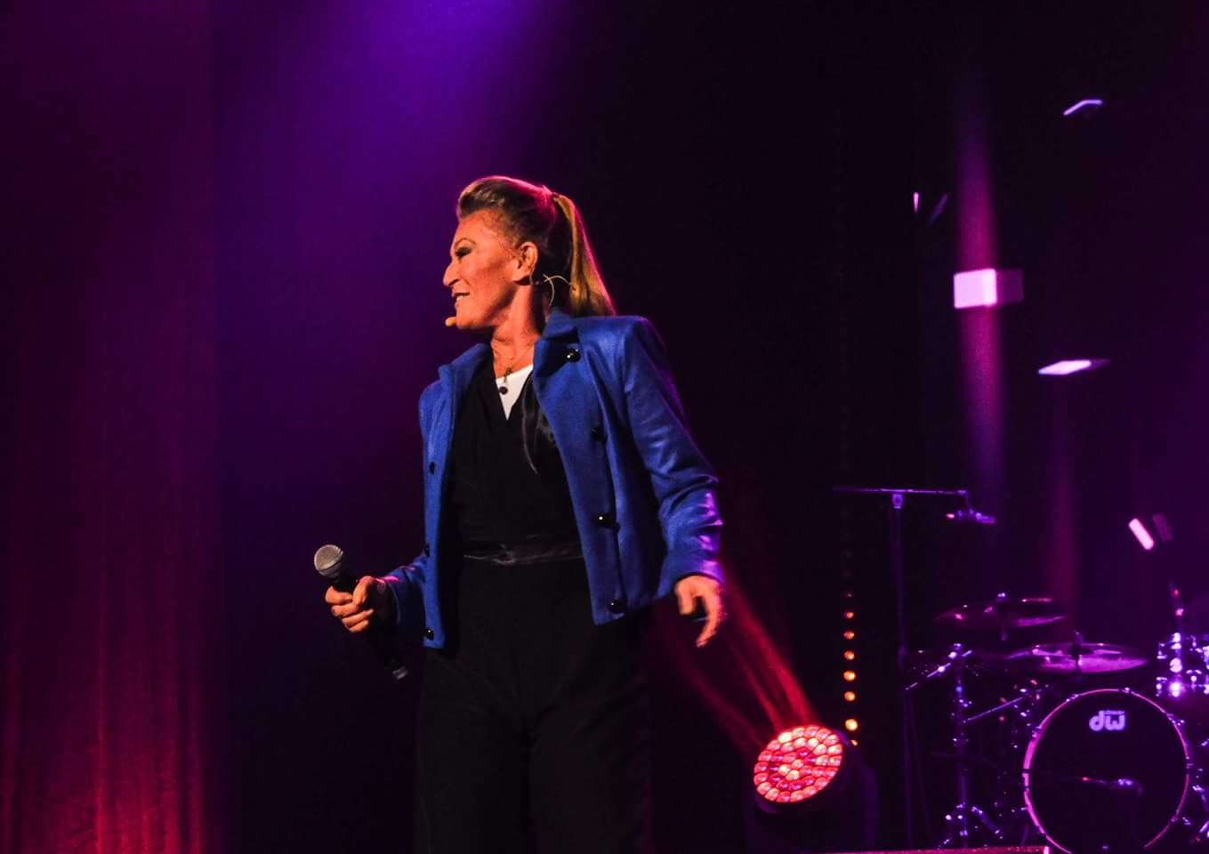 Sheila sur le 10è anniversaire de la tournée des idoles, Âge Tendre